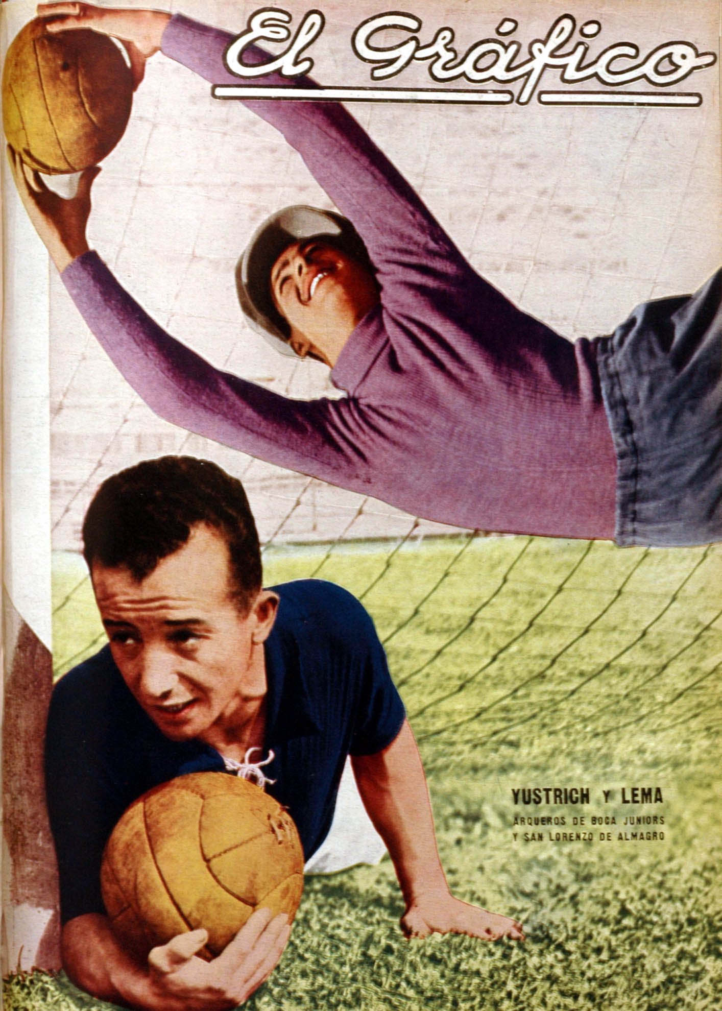 El Grafico del 04 de Noviembre de 1933. Edicion 747